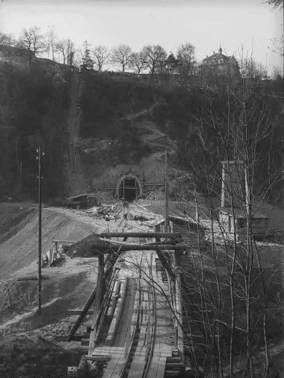 Bruggwaldtunnel, Blick auf das Südportal